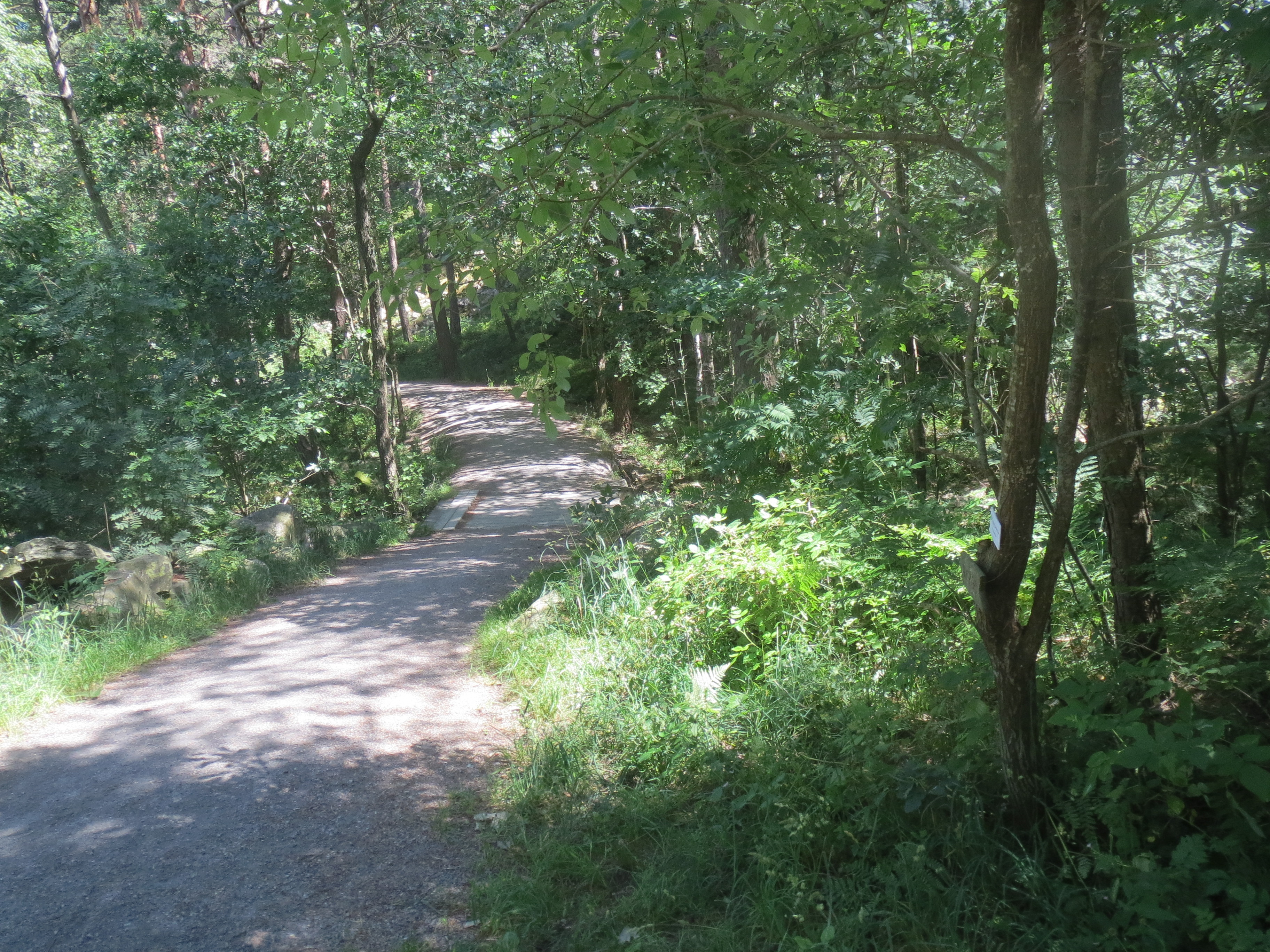 Naturreservat i Nedre Timenes, Kristiansand